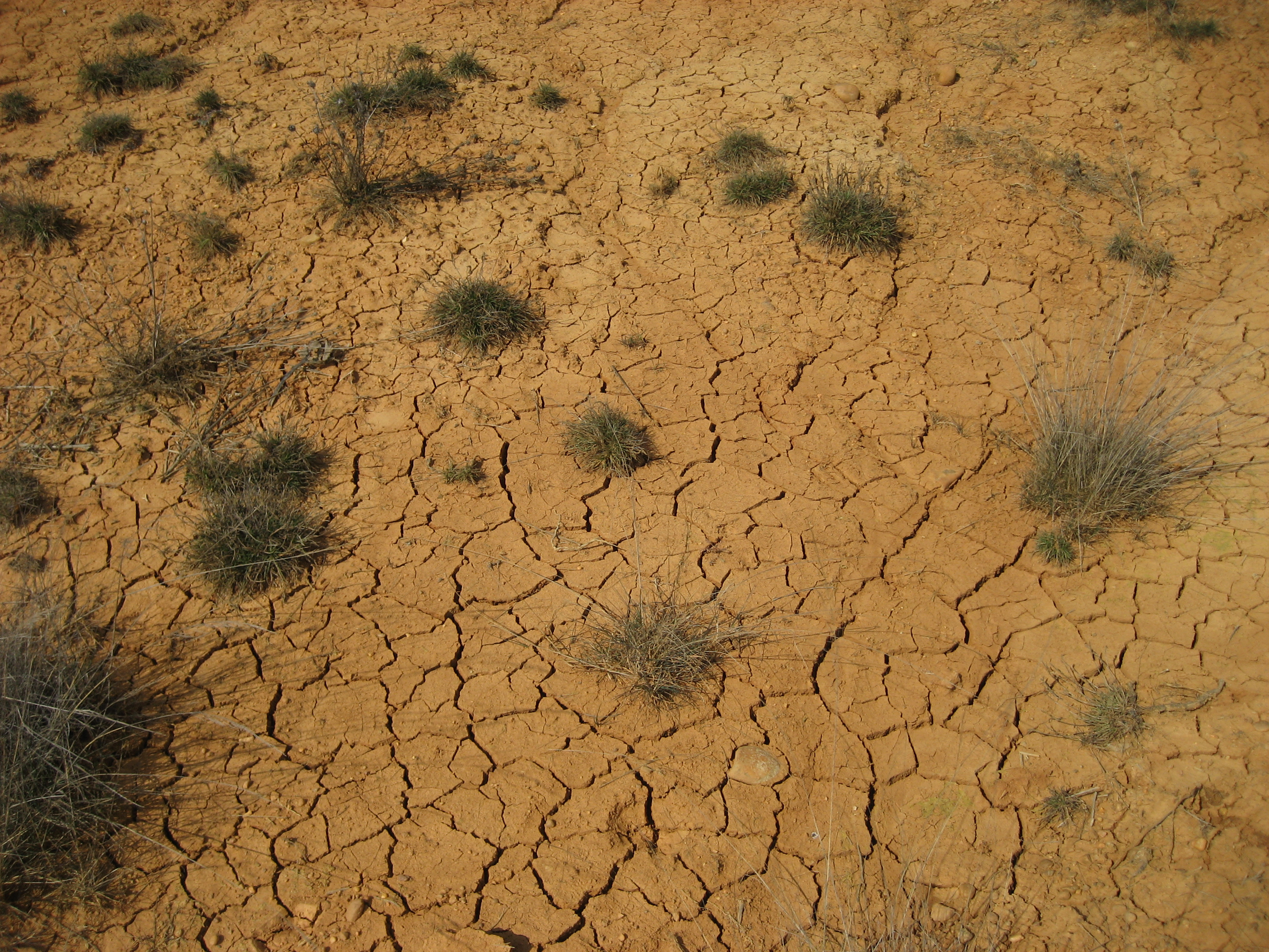 Fotografía de un suelo seco